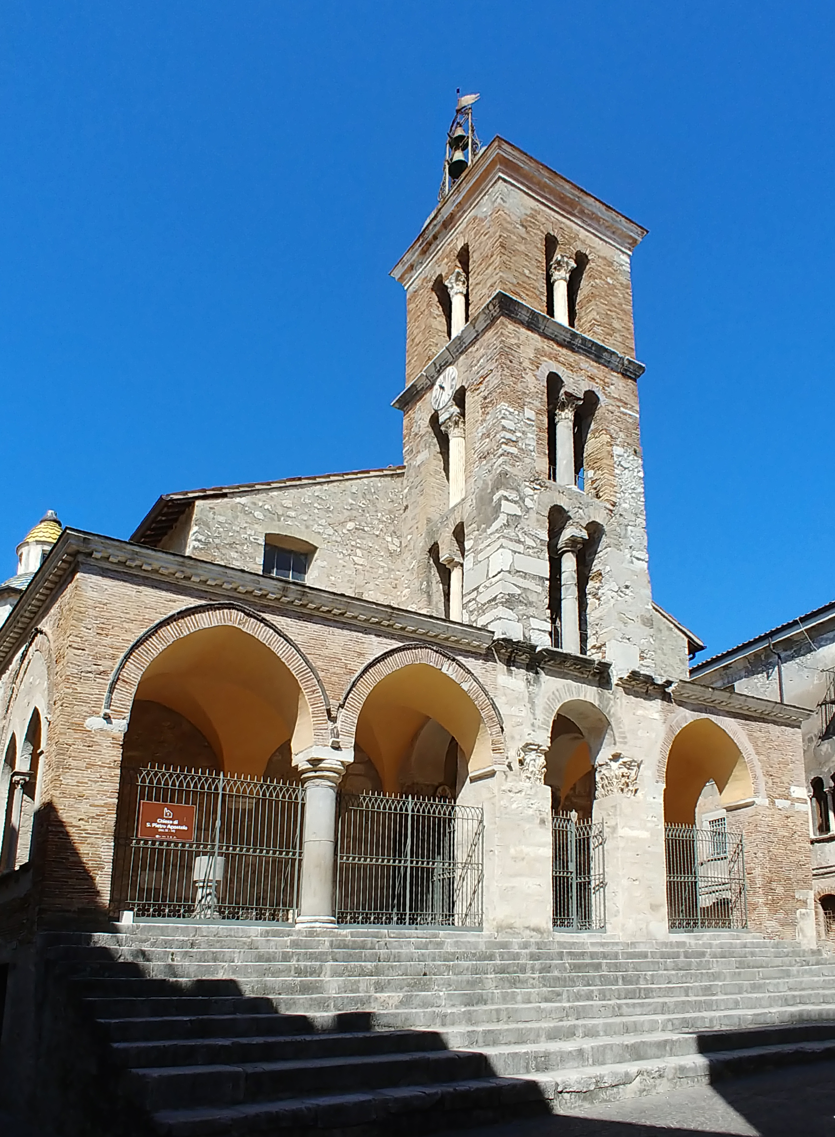 Facciata.